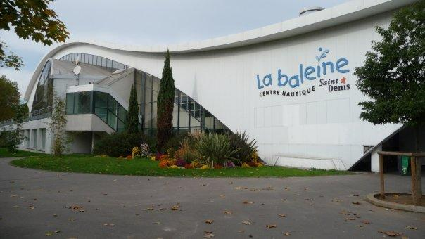 La piscine du SDUS "la baleine" vue de l'exterieur.